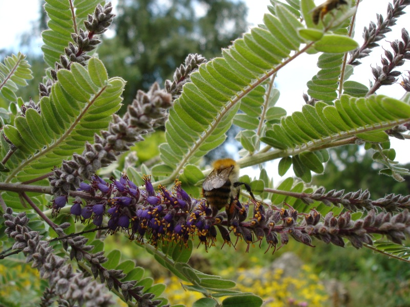 Amorpha nana, , Jardin des Plantes de Paris